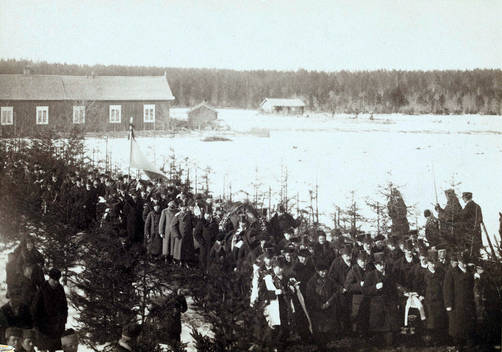 Elias Lönnrotin hautajaissaattue Sammatin koululta kirkolle 3.4.1884. Arkkua kantavat eri osakuntaien edustajat.